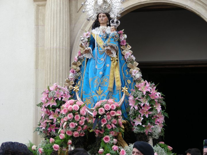 Procesión de Nuestra Señora de Loreto, Algezares (Murcia) 12 de diciembre de 2010